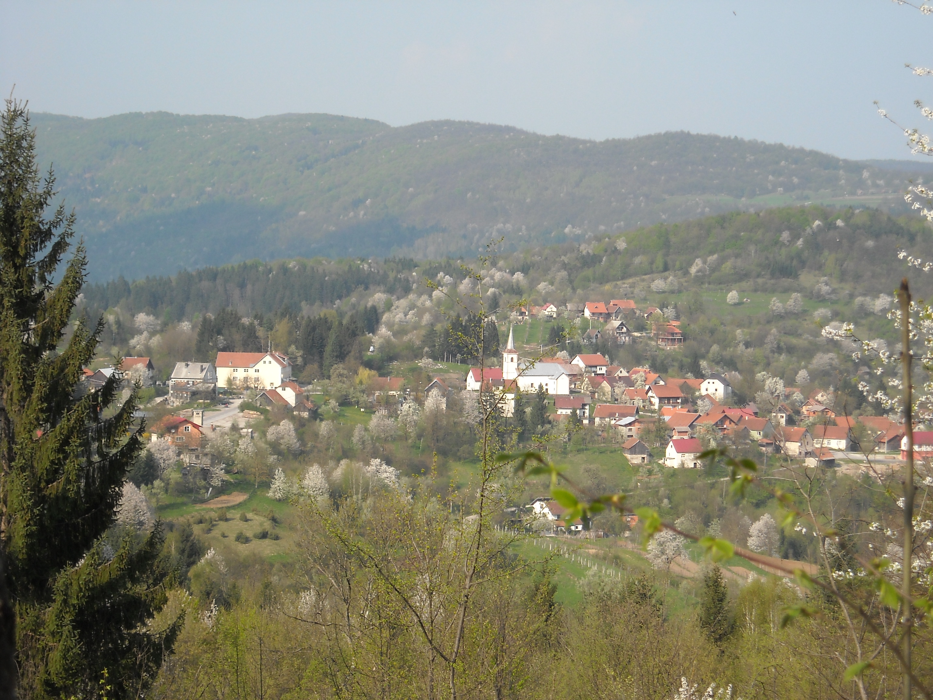 slika pokazuje naselje Lukovdol